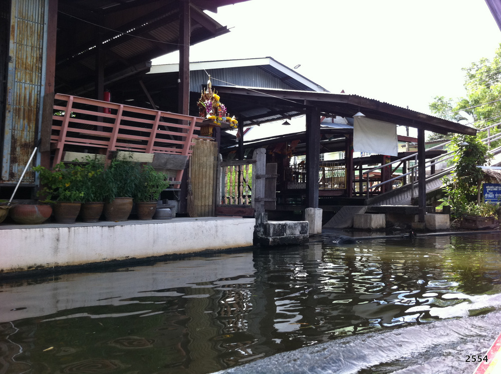 คลองลัดมะยม